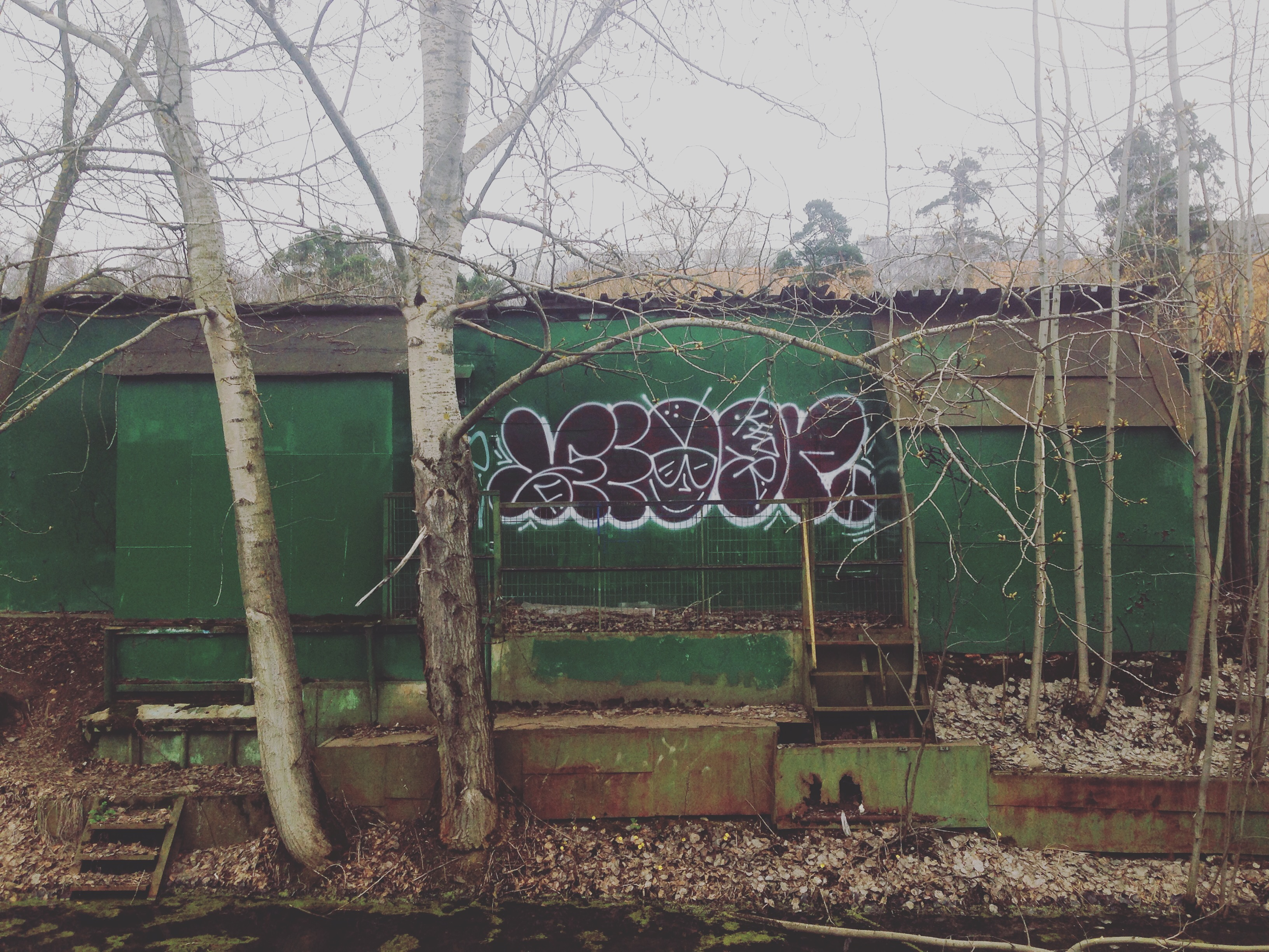 Москва